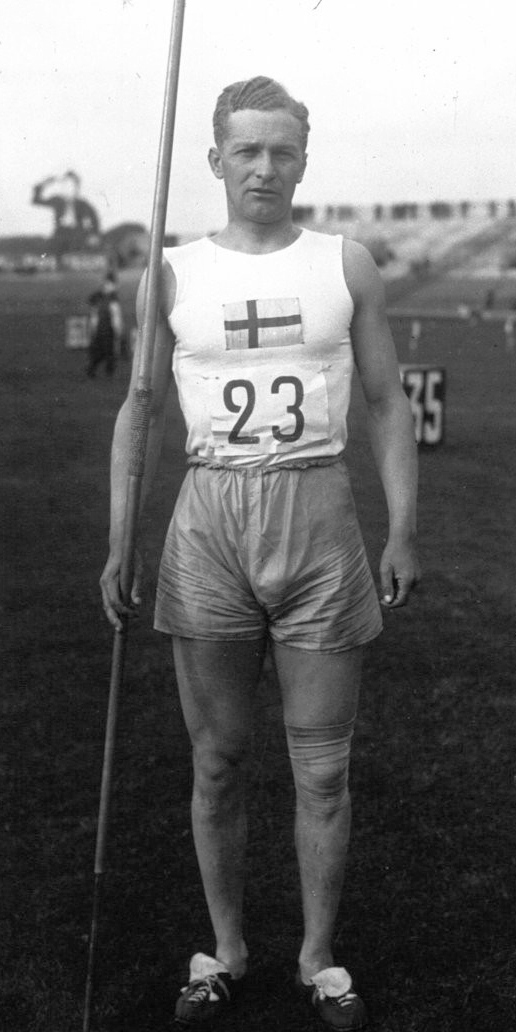 Suède-France athlétisme : lancement du javelot G. Lindstrom : [photographie de presse] / Agence Meurisse